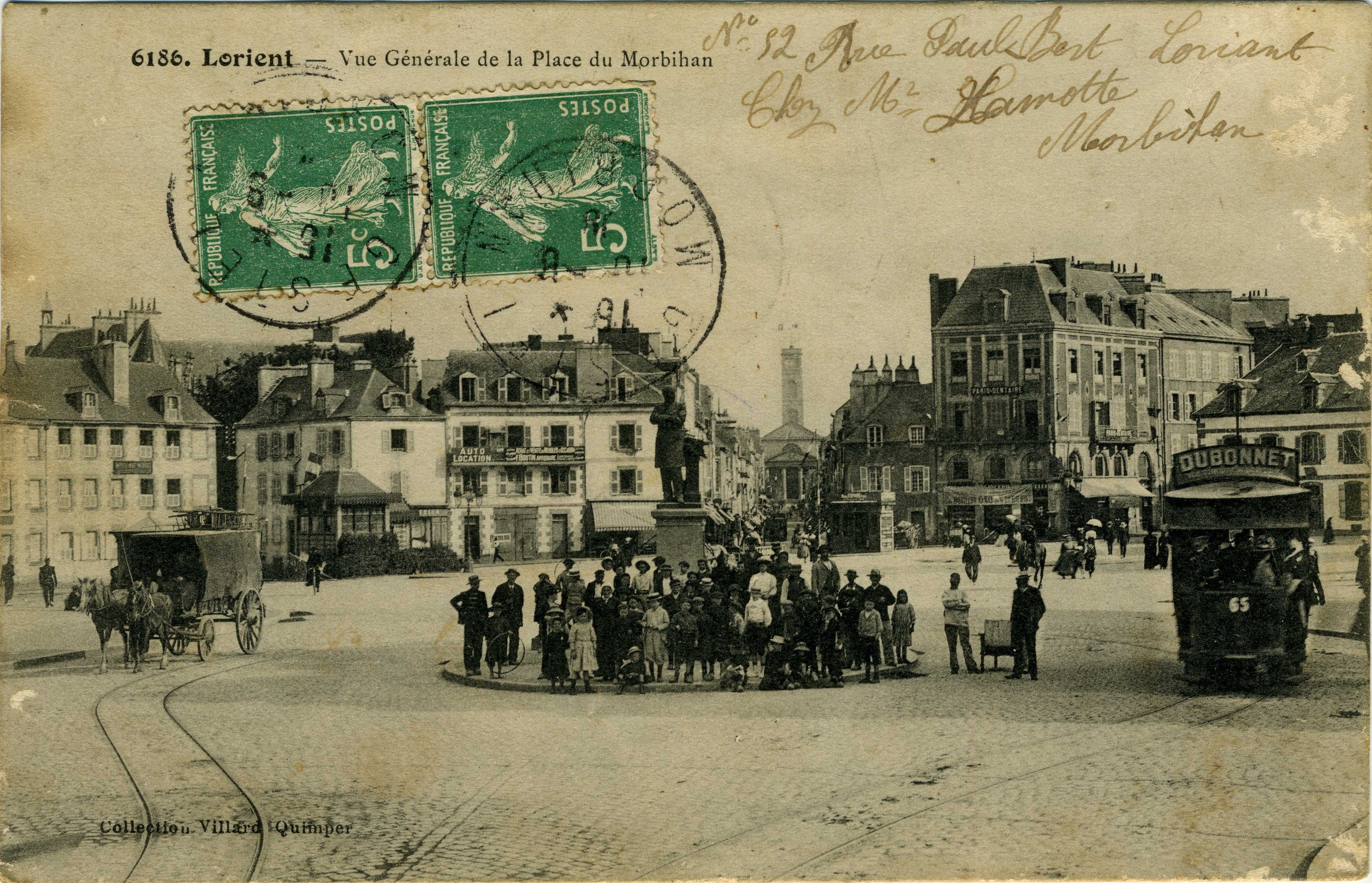 La place du Morbihan à Lorient dans le département du Morbihan, France. 1908.